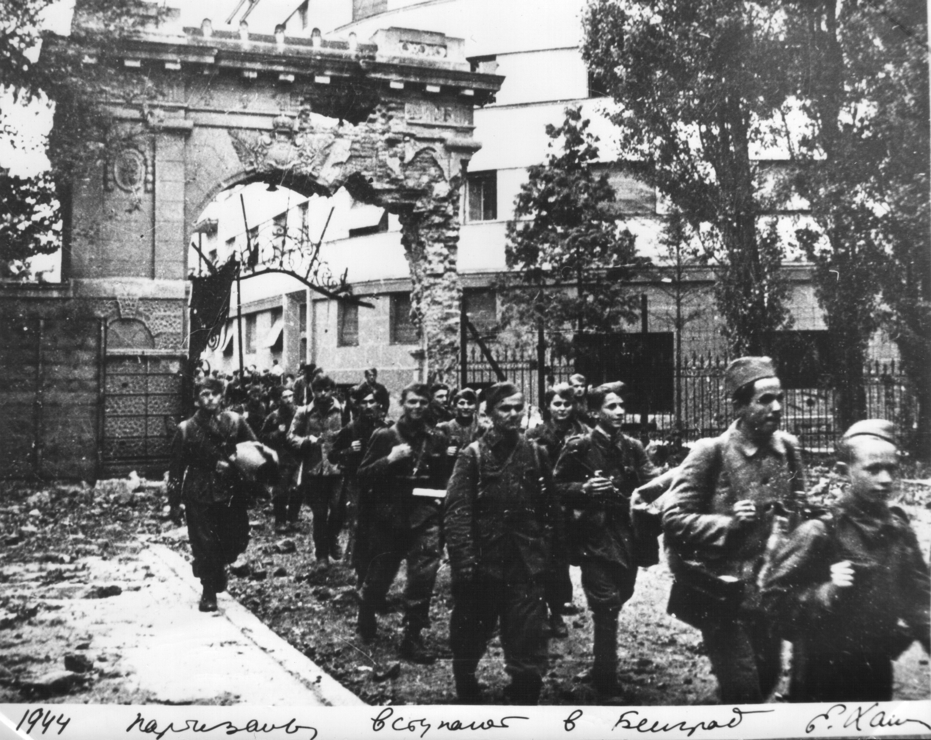 Srpskohrvatski / српскохрватски: Partizani ulaze u Beograd oktobra 1944.